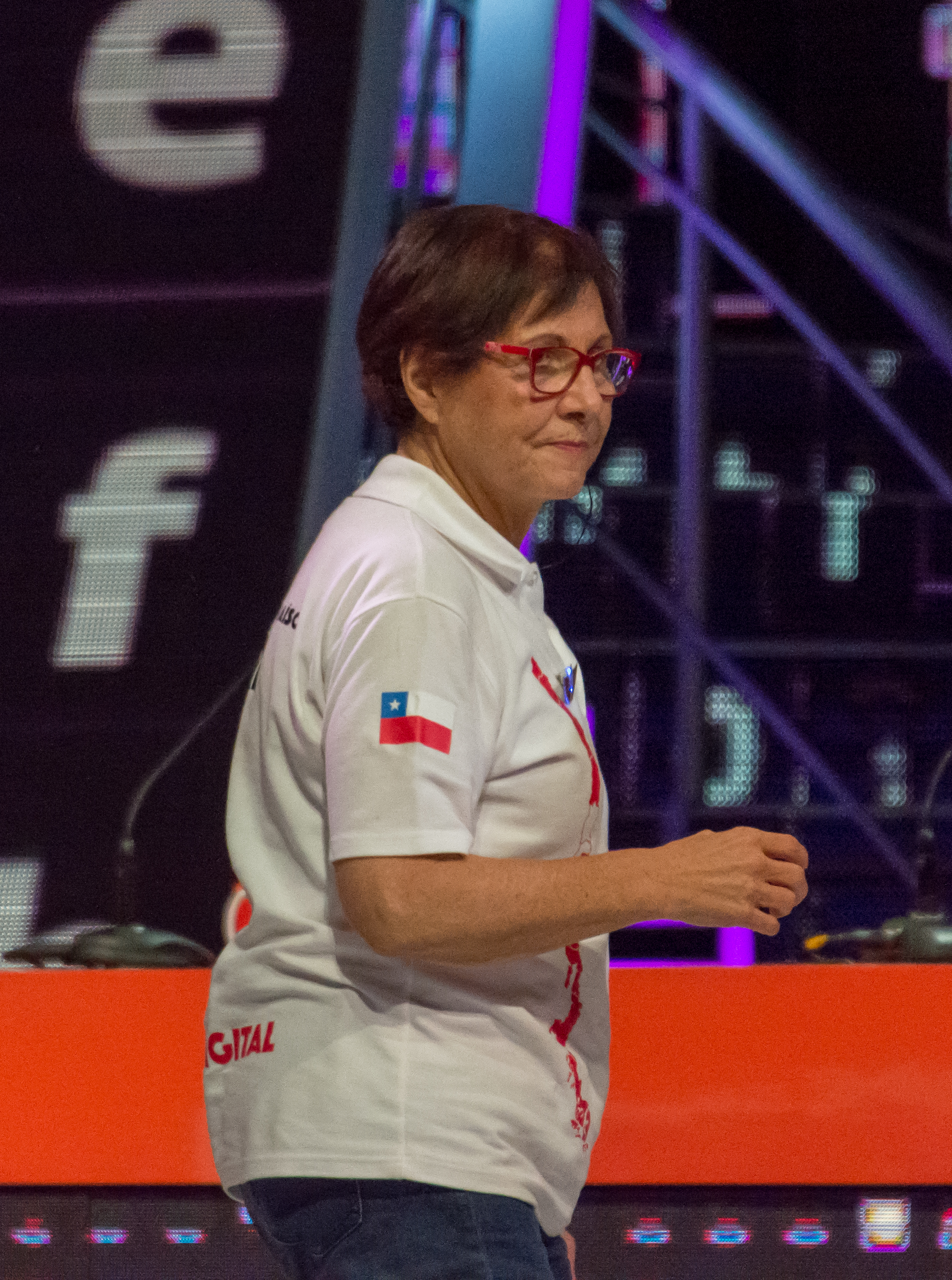 Teresita Reyes, Teletón 2018, Teatro Teletón, Santiago, Chile.